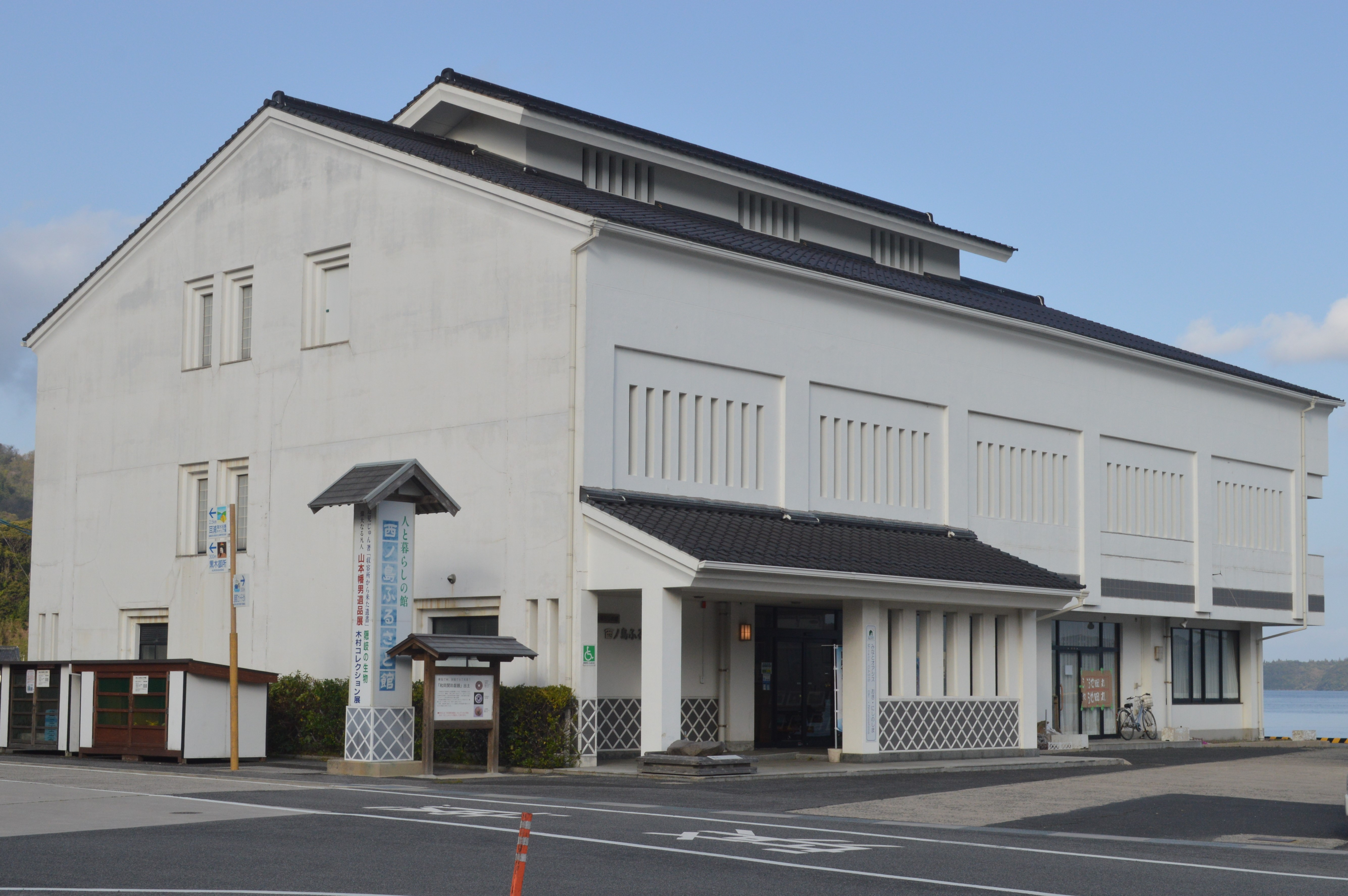 島根県隠岐郡西ノ島町の西ノ島ふるさと館。